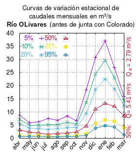 Curvas de variación estacional del río Olivares antes de junta con el Colorado. # cita publicación #| apellido = Dirección General de Aguas #| nombre = #| enlace-autor = Ministerio de Obras Públicas (Chile) #| título = Diagnóstico y clasificación de los cursos y cuerpos de agua según objetivos de calidad. Cuenca del río Maipo #| ubicación = Santiago de Chile #| editorial = Ministerio de Obras Públicas (Chile) #| año = 2004 #| edición = #| url = #| urlarchivo = #| fechaarchivo = #| ref = harv # Tabla 4.7: Estación Olivares antes de Junta con Colorado pág. 59 mes 5% 10% 20% 50% 85% 95% abr 8.88 7.28 5.61 3.15 1.28 0.67 may 5.83 4.91 3.93 2.43 1.19 0.73 jun 6.31 4.94 3.67 2.08 1.03 0.68 jul 7.54 5.15 3.29 1.50 0.70 0.52 ago 6.89 5.14 3.61 1.84 0.80 0.49 sep 8.55 6.07 4.05 1.96 0.93 0.67 oct 6.69 5.38 4.10 2.40 1.17 0.72 nov 18.43 13.57 9.37 4.61 1.93 1.15 dic 30.84 24.55 18.62 10.97 5.72 3.90 ene 37.14 29.59 22.47 13.28 6.95 4.75 feb 26.83 22.95 18.75 12.18 6.48 4.20 mar 15.85 14.24 12.29 8.57 3.97 1.28 This plot was created with Gnuplot.